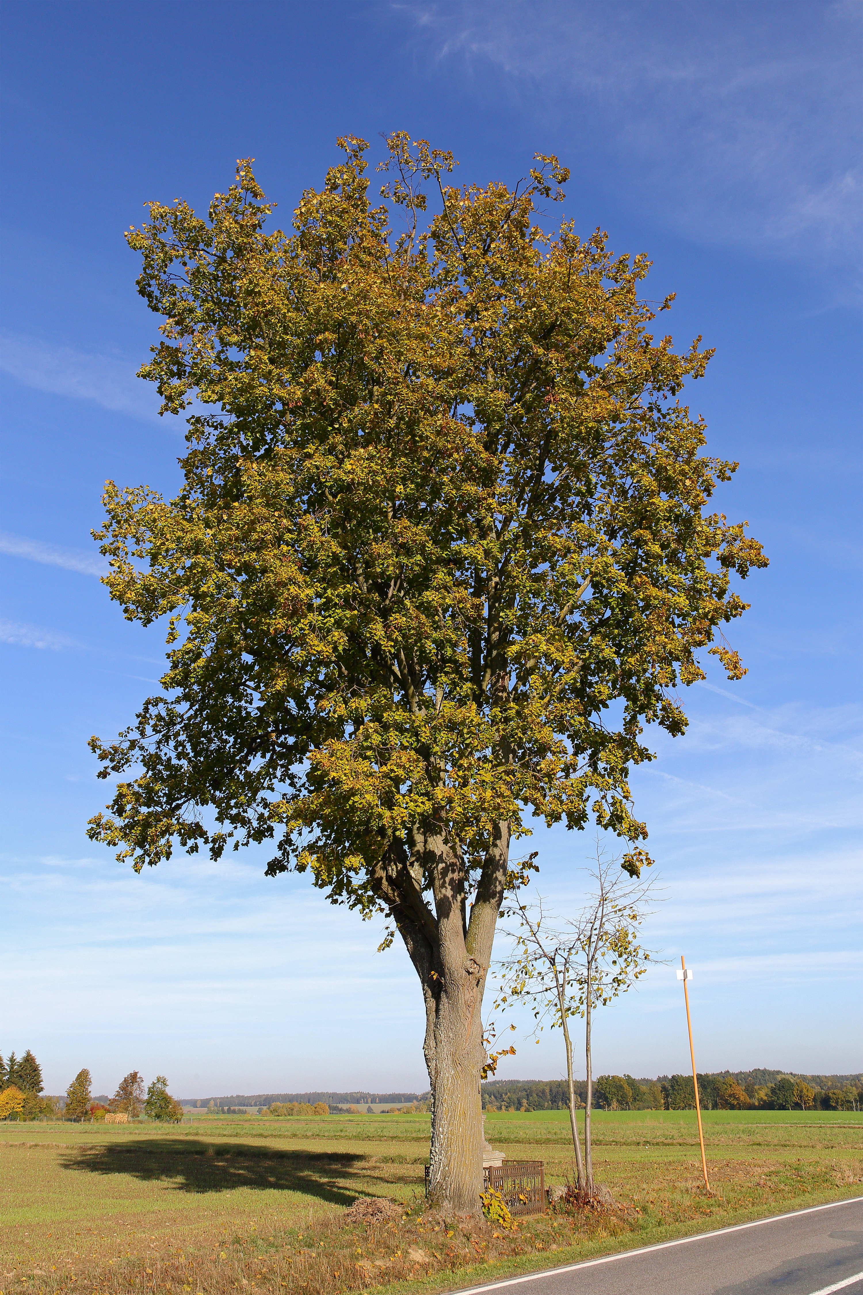 Im Jahr 1961 wurden die beiden Sommerlinden beim Wegkreuz östlich von Kautzen zum Naturdenkmal erklärt. Etwa um das Jahr 2000 musste die östliche der beiden Linden gefällt werden. This media shows the natural monument in Lower Austria with the ID WT-041.